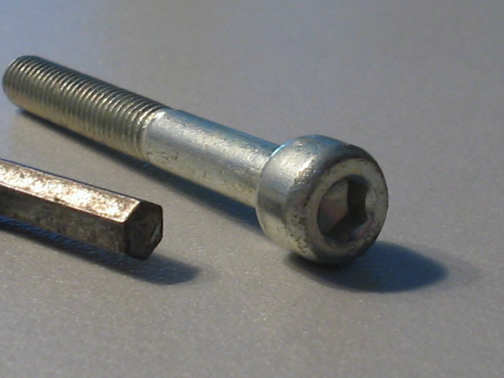 inbusbout en sleutel